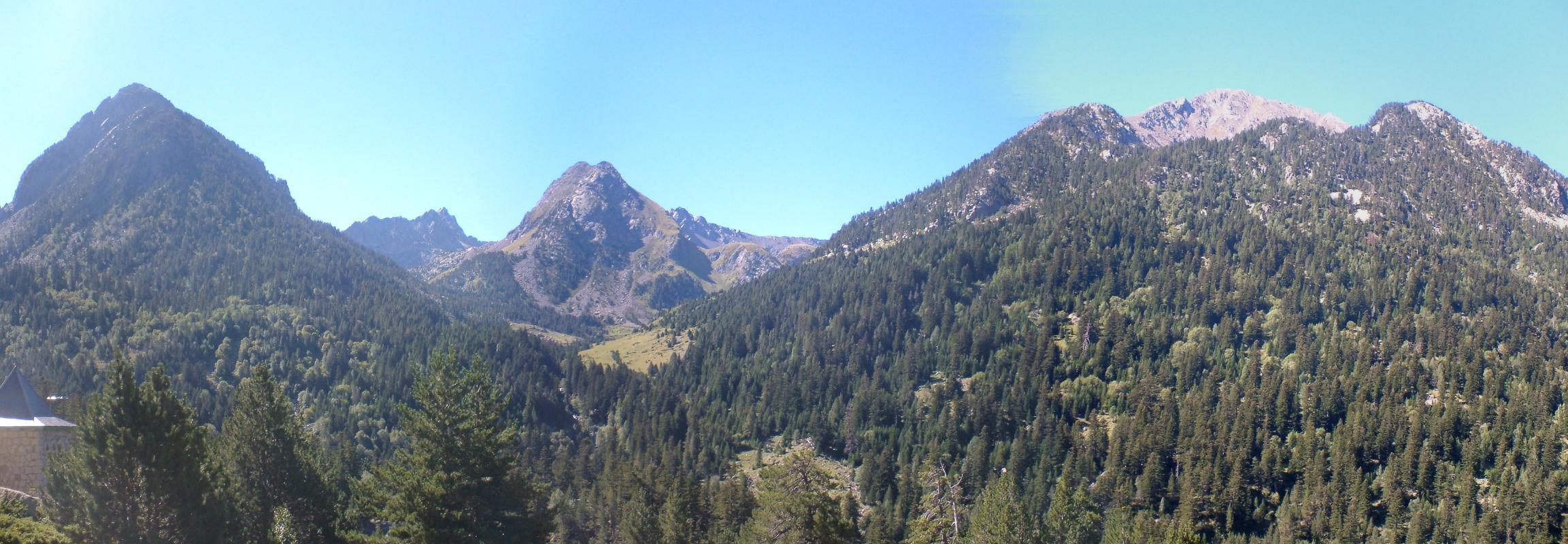 Ribera de Llacs; la Vall de Boí, Alta Ribagorça, Catalunya